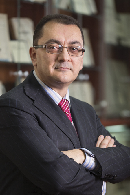 Српски (ћирилица): проф. др Горан Милошевић